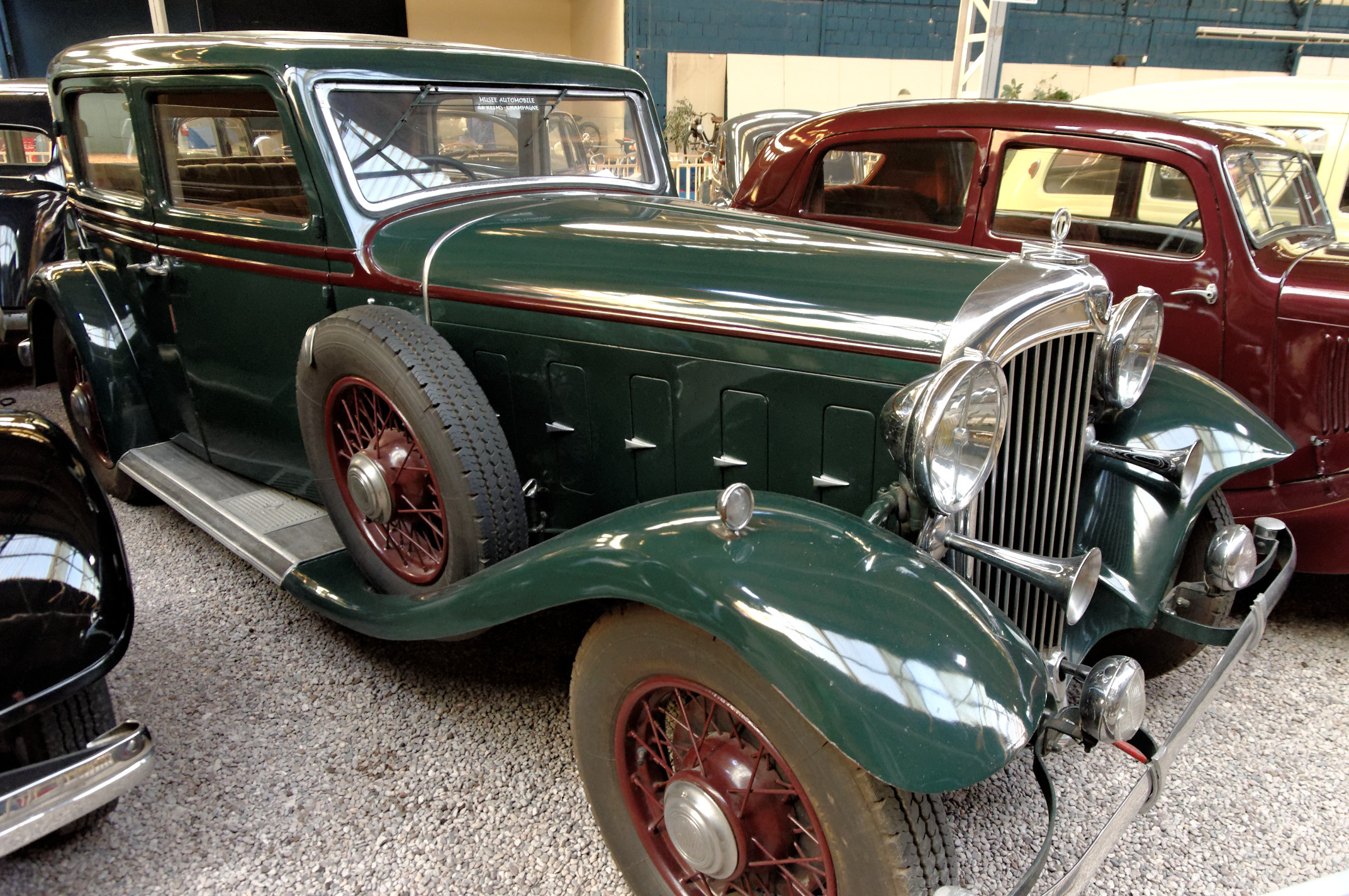 Talbot H 75 Super Fulgur (1934), Berline 4 portes, 5 places, 8 cyl. en ligne, culbuté, 3380 cm3, 88 ch. à 3400 tours, vitesse max. 150 km/h Country of origin: France (Musée Automobile Reims Champagne, Reims, Marne, France)